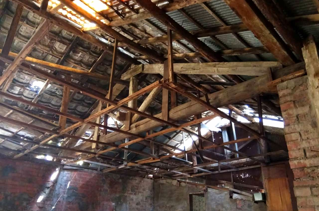 中文（台灣）: 台灣省城儒考棚屋樑